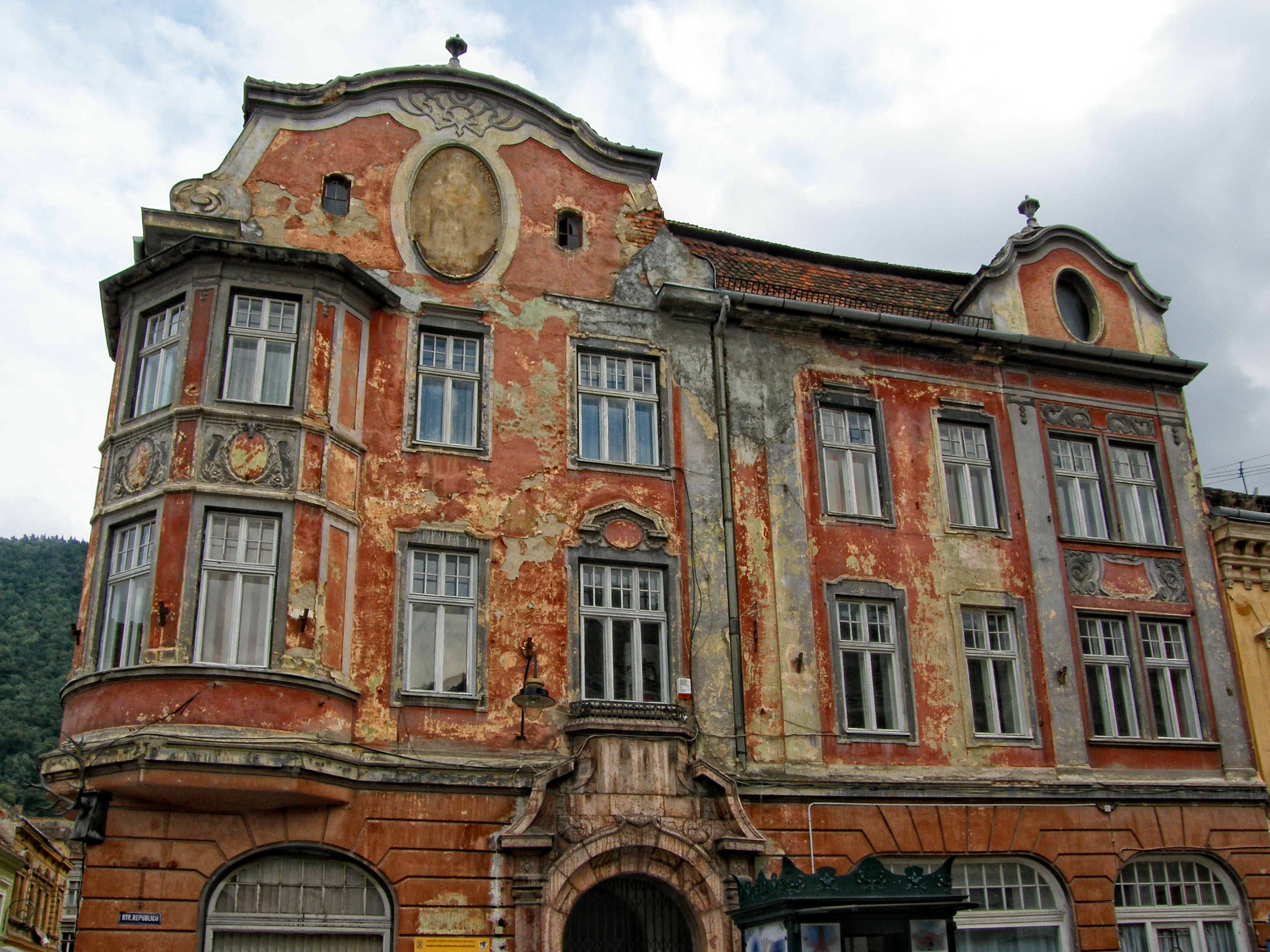 Fațadă pe Strada Republici, Brașov